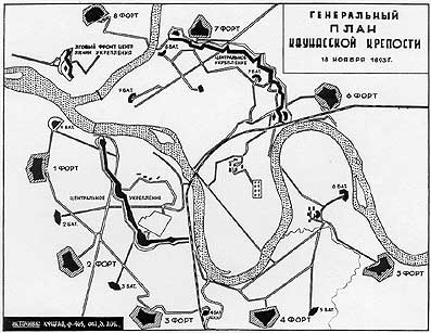 Kauno tvirtovės planas.